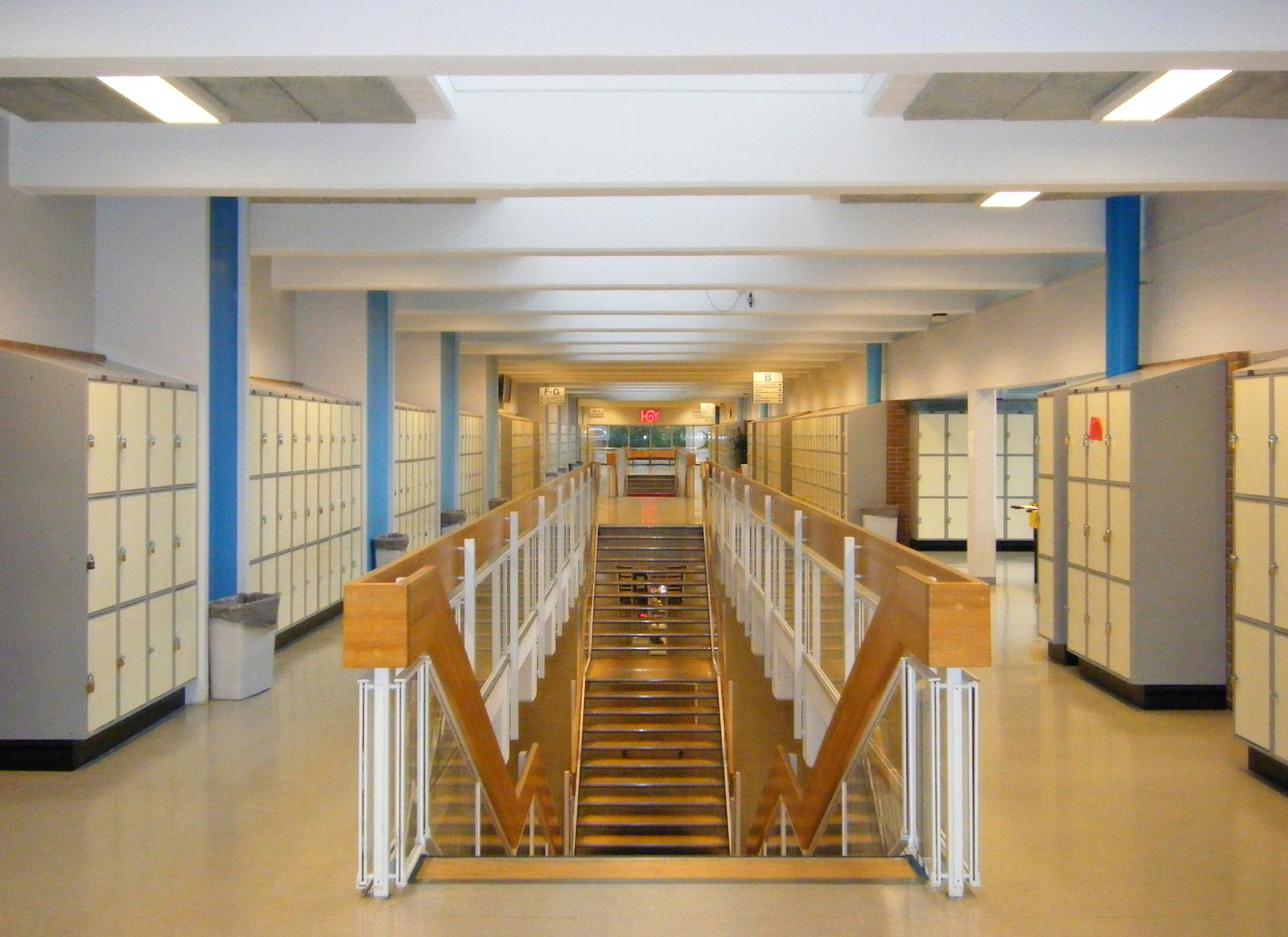 Inne i Huddingegymnasiet